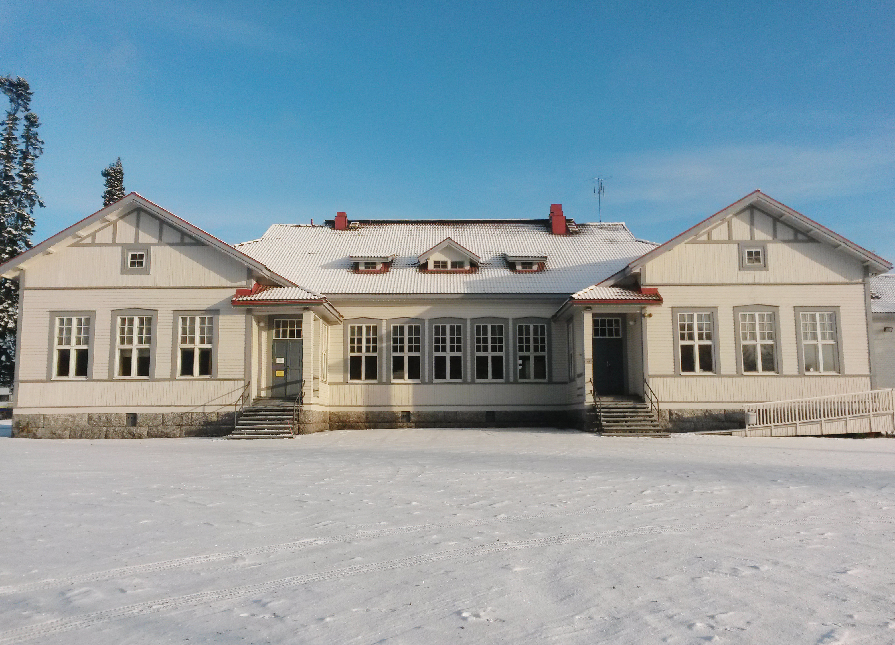 Viitasaaren vanha yhteiskoulu, jota kutsutaan myös puulukioksi.